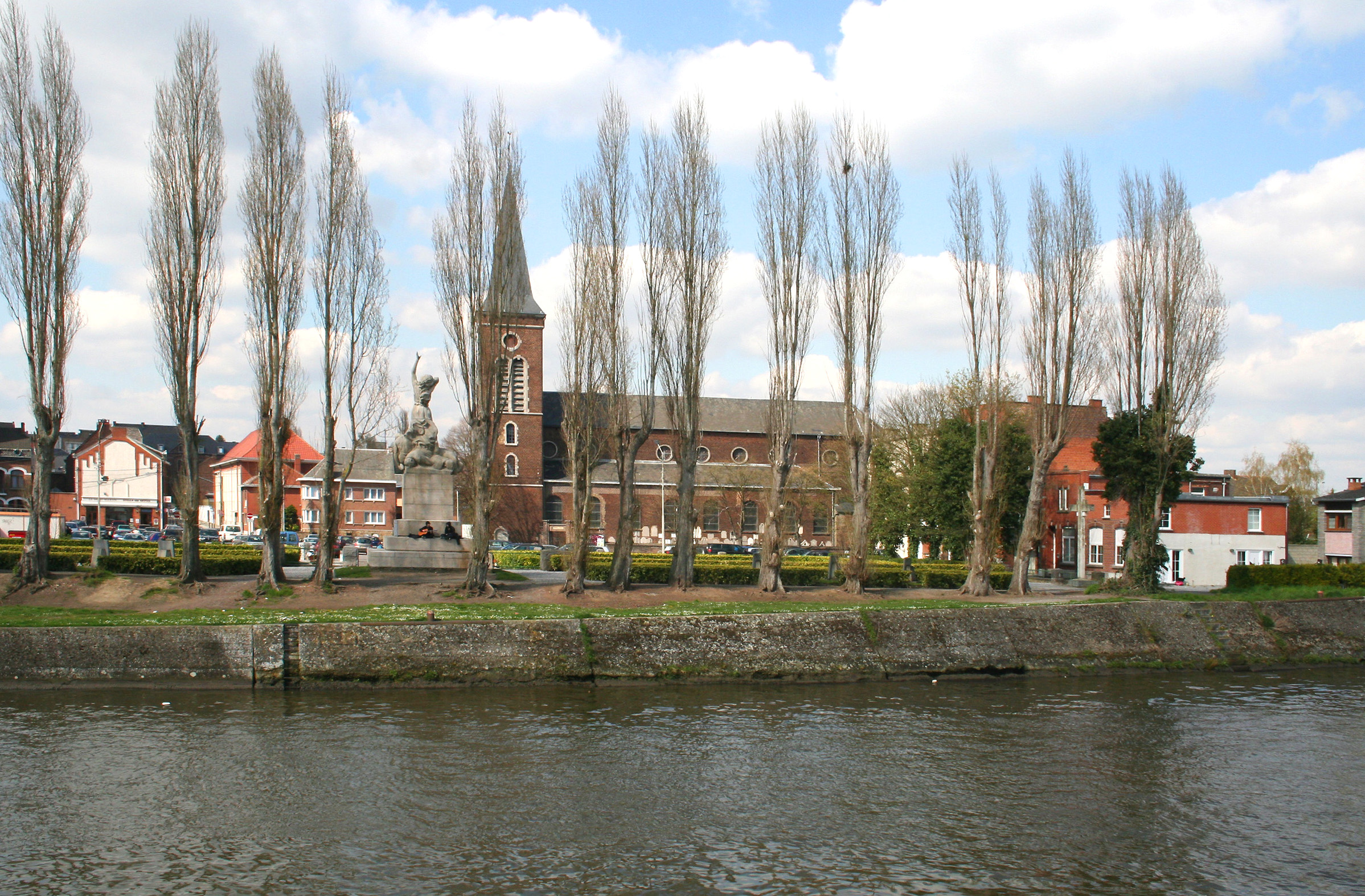 Tamines, Place Saint-Martin, l'église Saint-Martin et le monument érigé en souvenir des victimes du massacre du 22 août 1914. Walon: Tamines, Place Sint-Maurtin, l'èglîje Sint-Maurtin èt l' monumint lèvè è sovnance dès victimes do massacre do 22 d'awous' 1914.